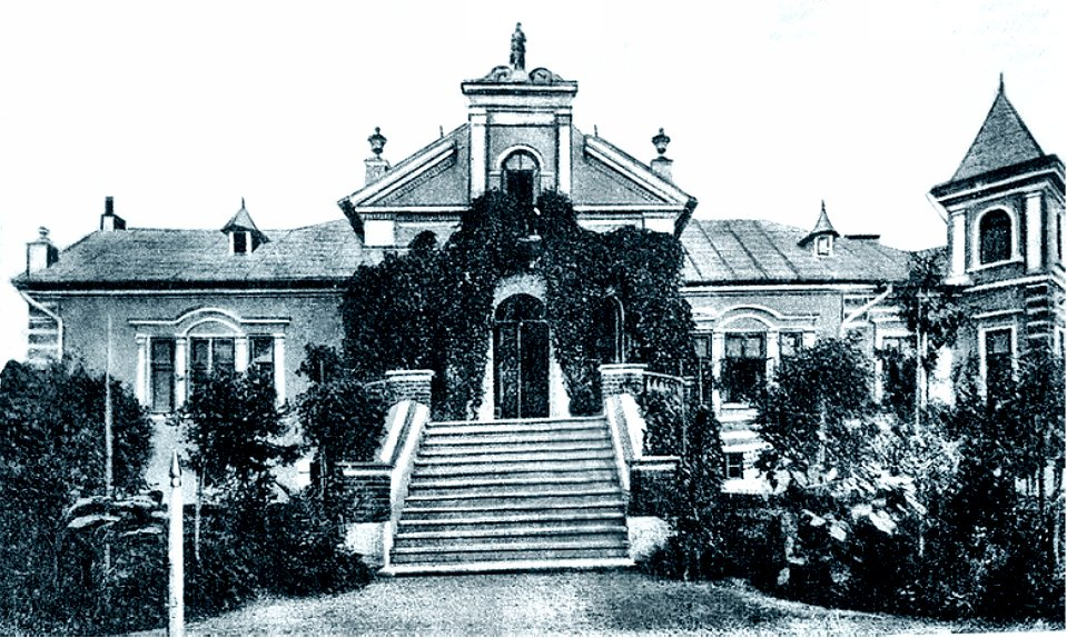 Schloss Hlinitza vor 1900, Ausschnitt von einer Ansichtskarte